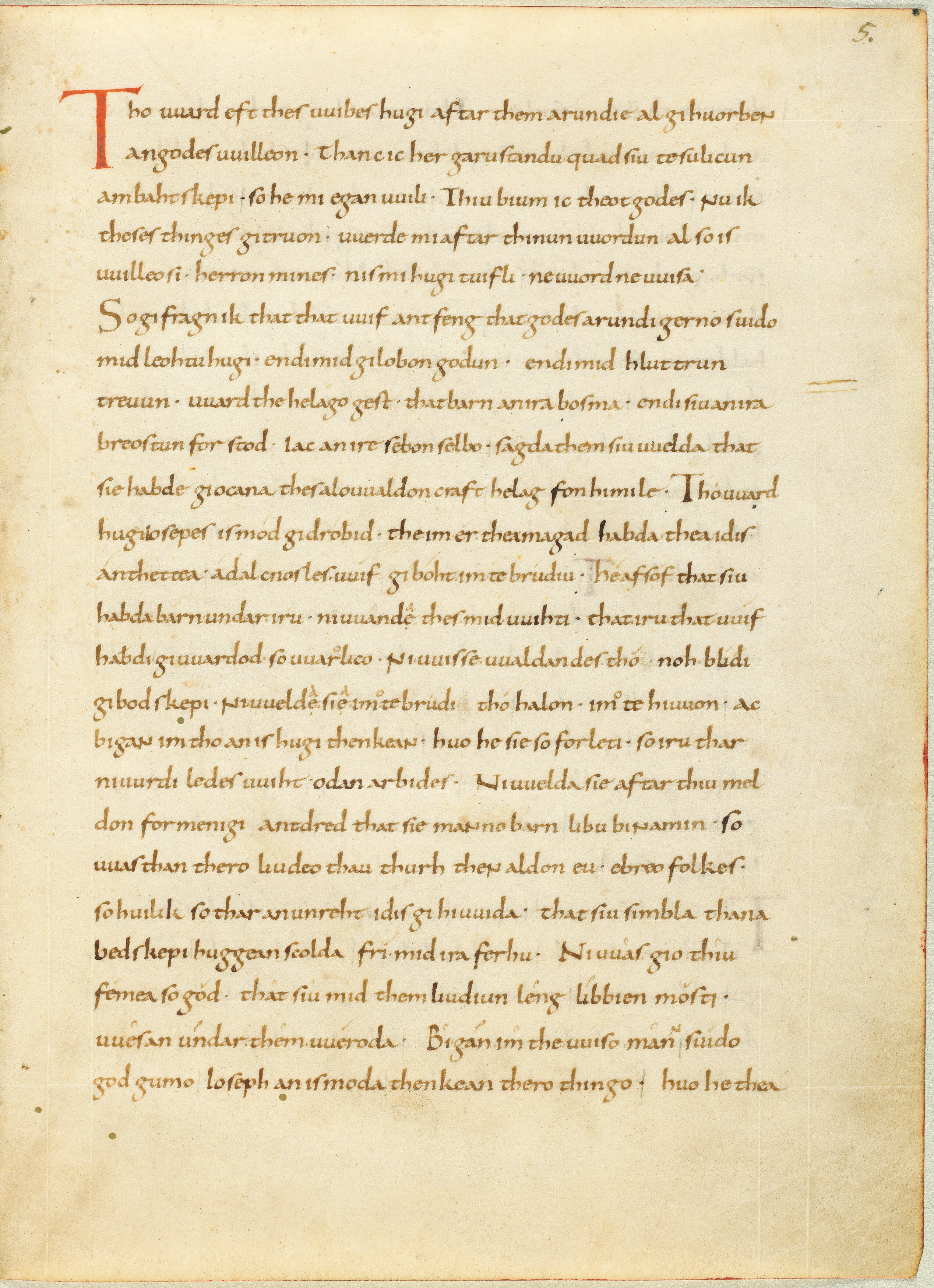 Seite aus der Münchner Heliand Handschrift Cgm 25. Fitte 50